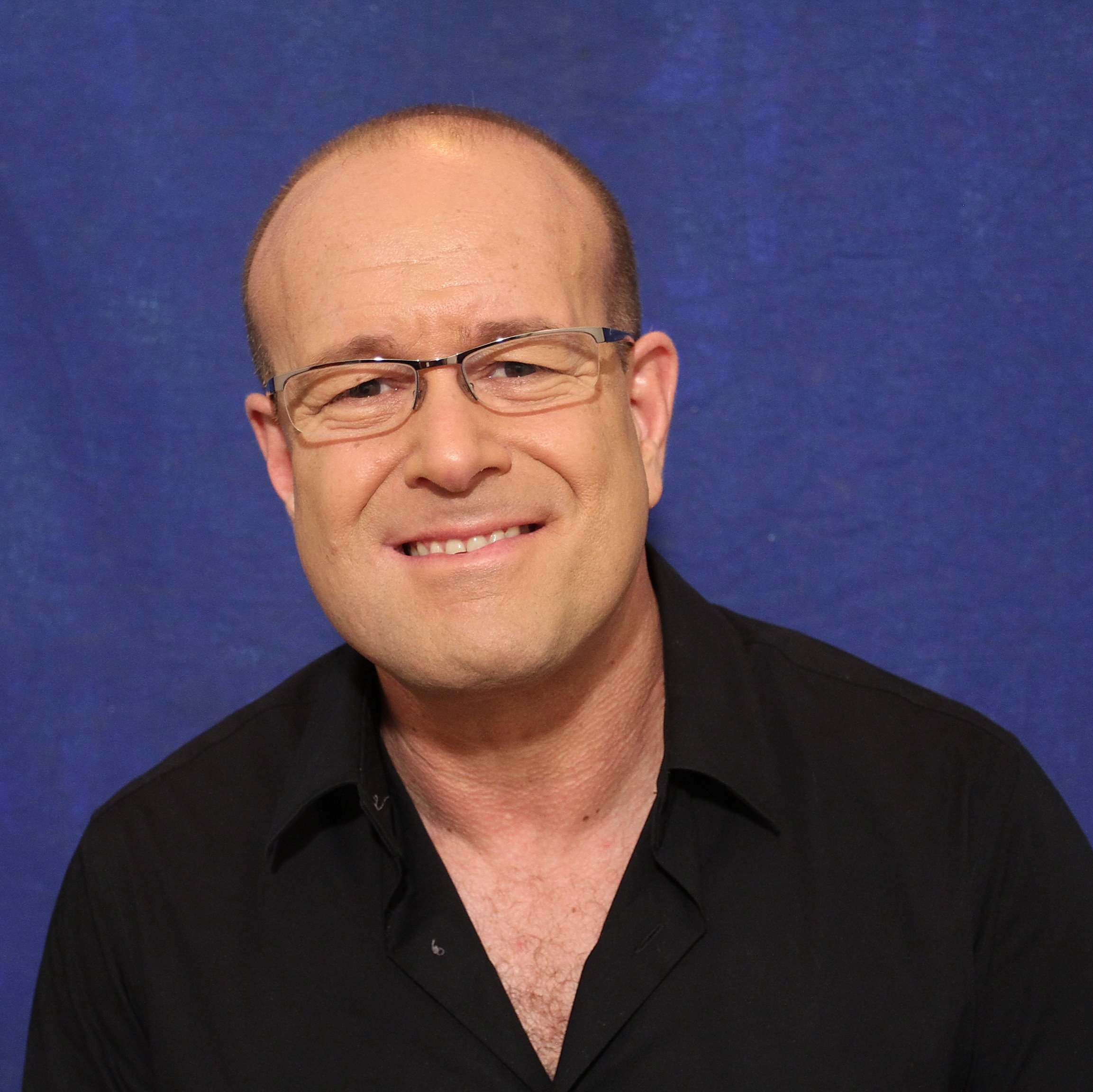 יגאל רביד